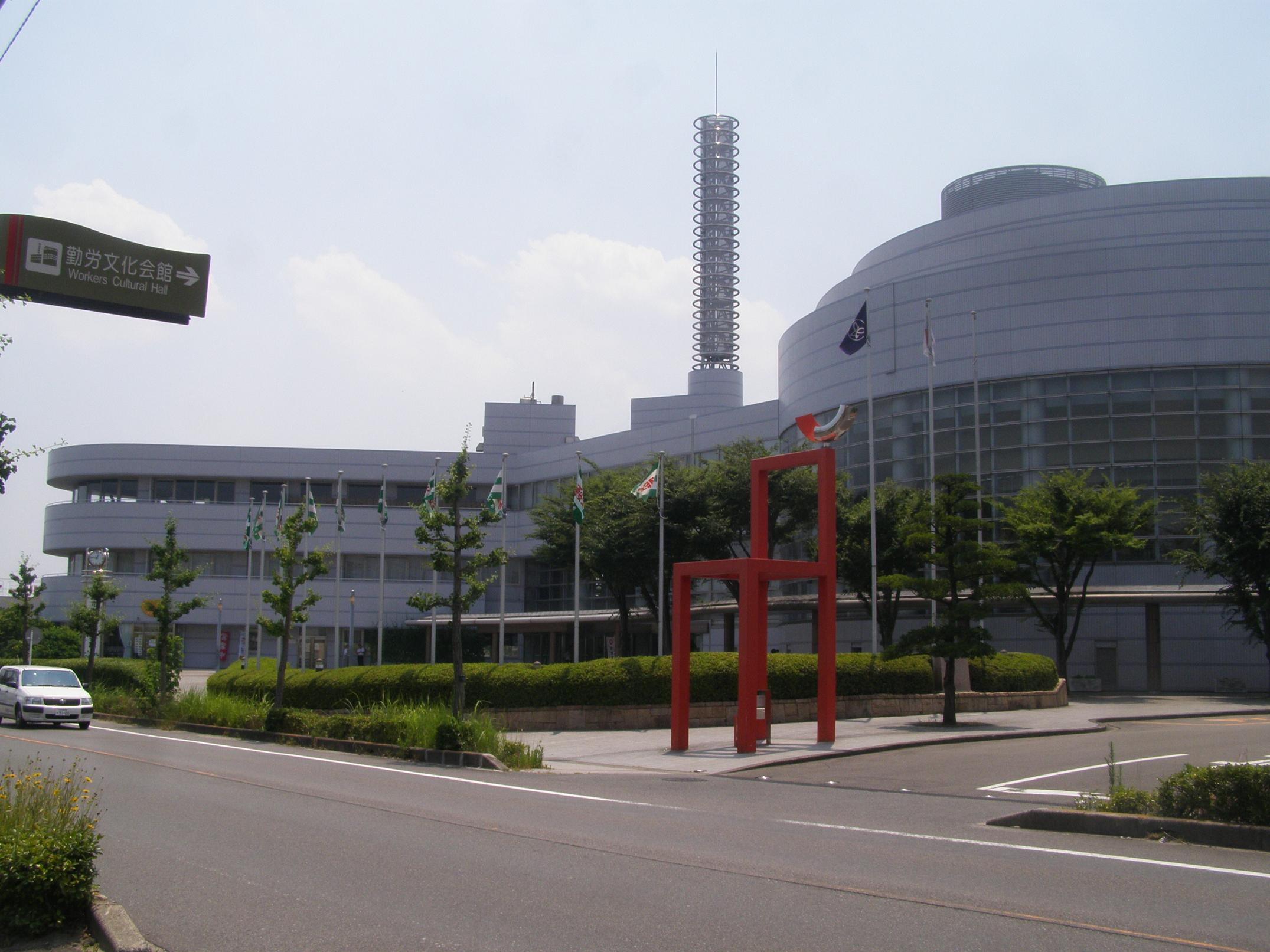 大府市勤労文化会館